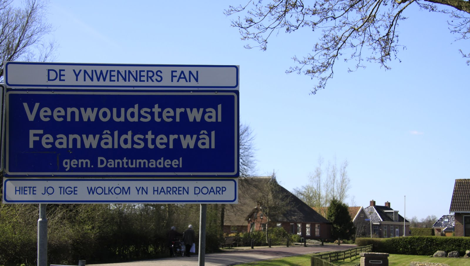 Feanwâldsterwâl